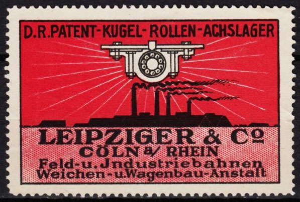 Leipziger & Co., Köln am Rhein, Feld- und Industriebahnen, Weichen- und Wagenbau-Anstalt. Deutsches Reichspatent auf Kugel-,Rollen-, und Achslager